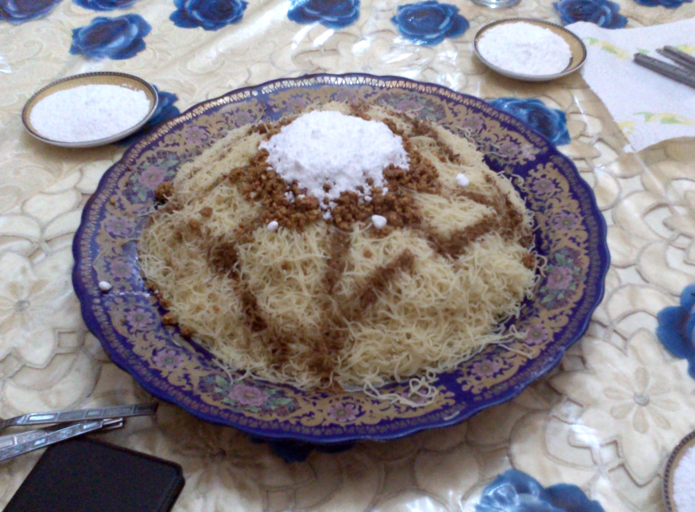 Seffa du Maroc